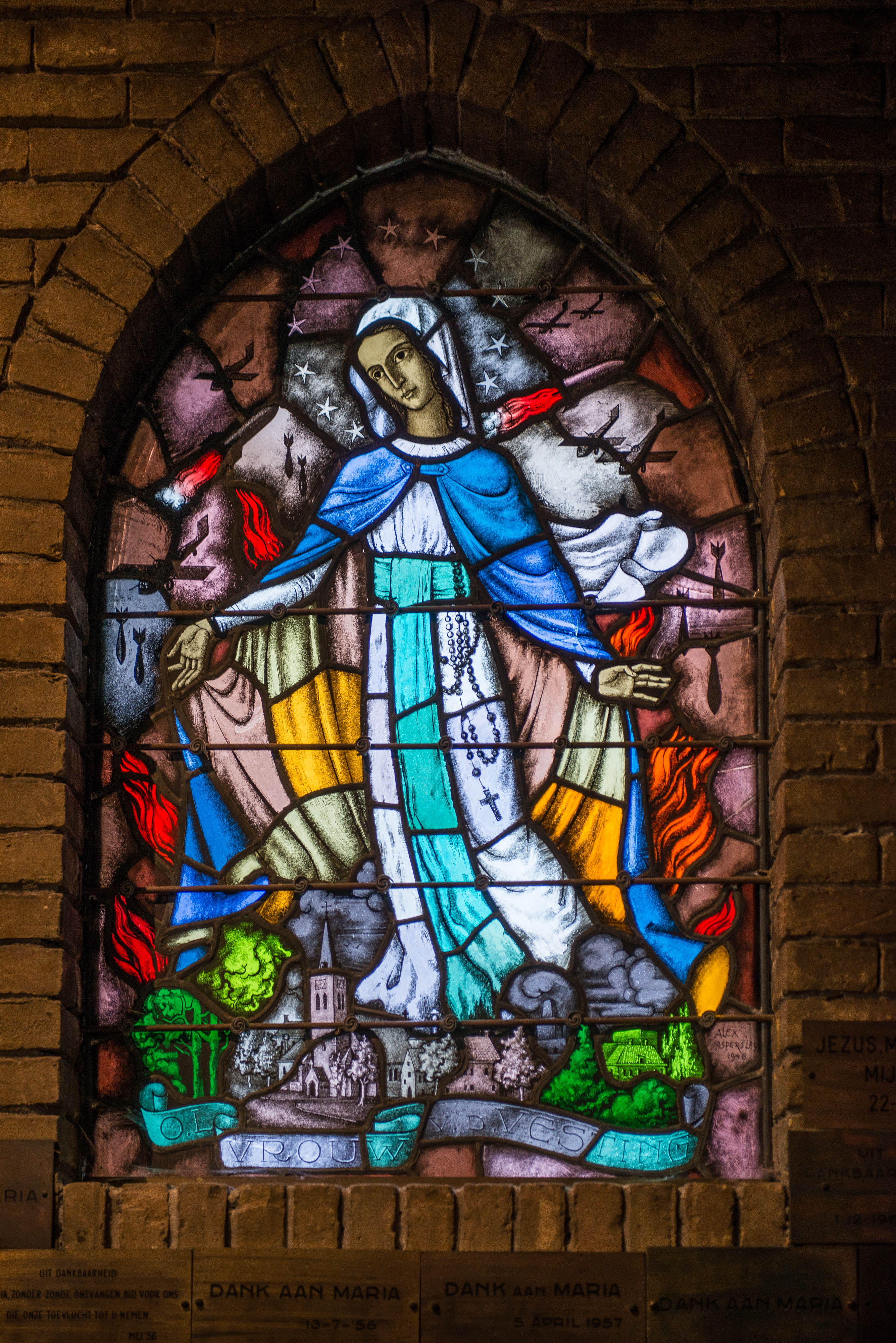 Deze foto toont Maria als Onze Lieve Vrouw van de vesting. Onderin de Paschalis kerk, bovenin bommenwerpers en bommen als herinnering aan de tweede wereldoorlog. Gemaakt door Alex Asperslagh in 1946.